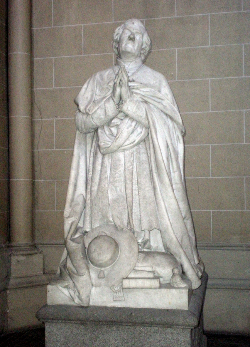 L'orant en marbre de Monseigneur Thomas Gousset, archevêque de Reims, visible en l'église Saint-Thomas de Reims.